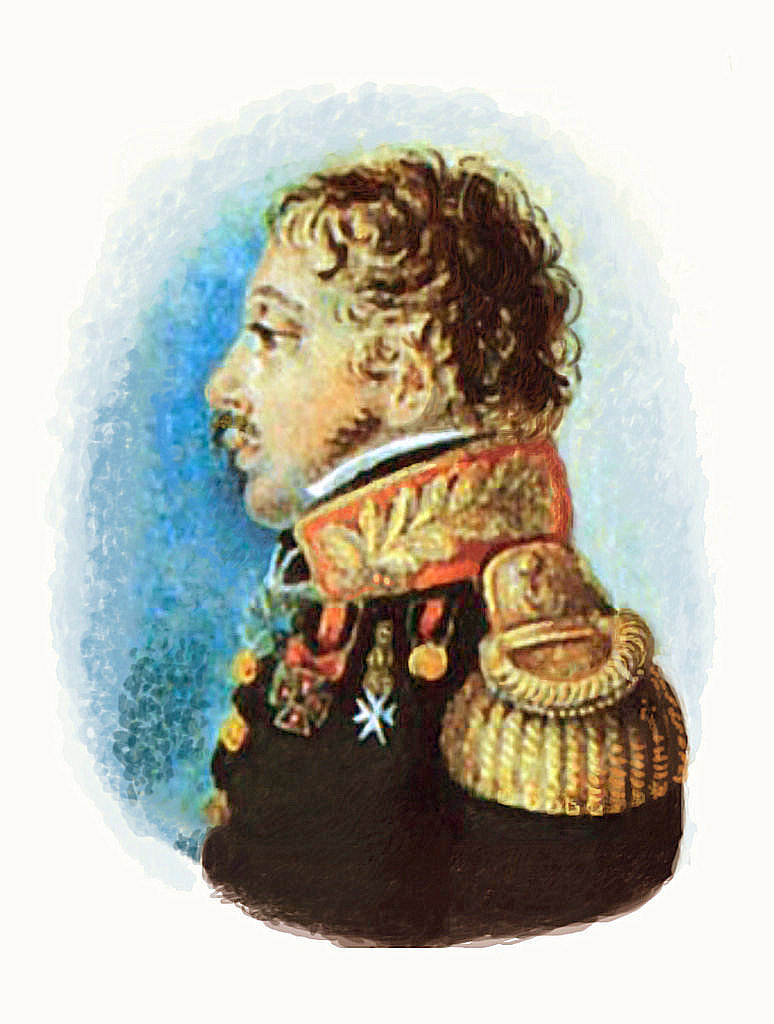 Портрет генерал-майора, создателя Хитровской площади в Москве - Н.З.Хитрово. П.Э.Рокштуль. Середина1810-х гг. Бумага, акварель.